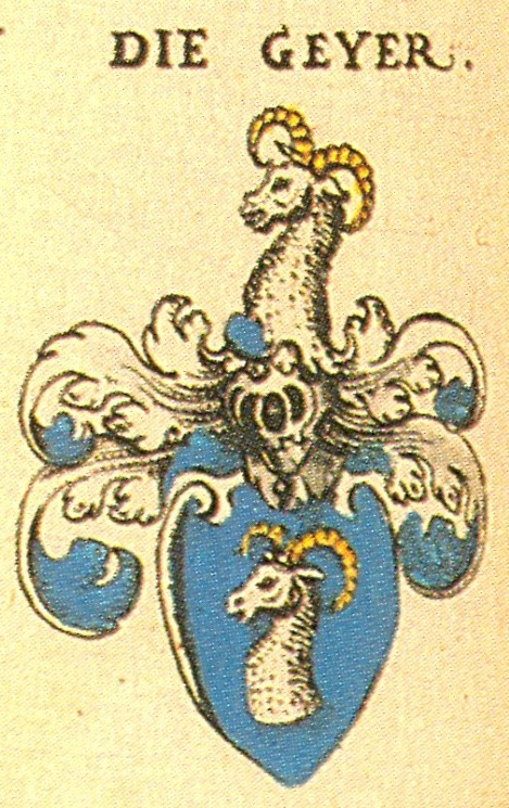 Ritterschaft und Adel in Franken von Geyer